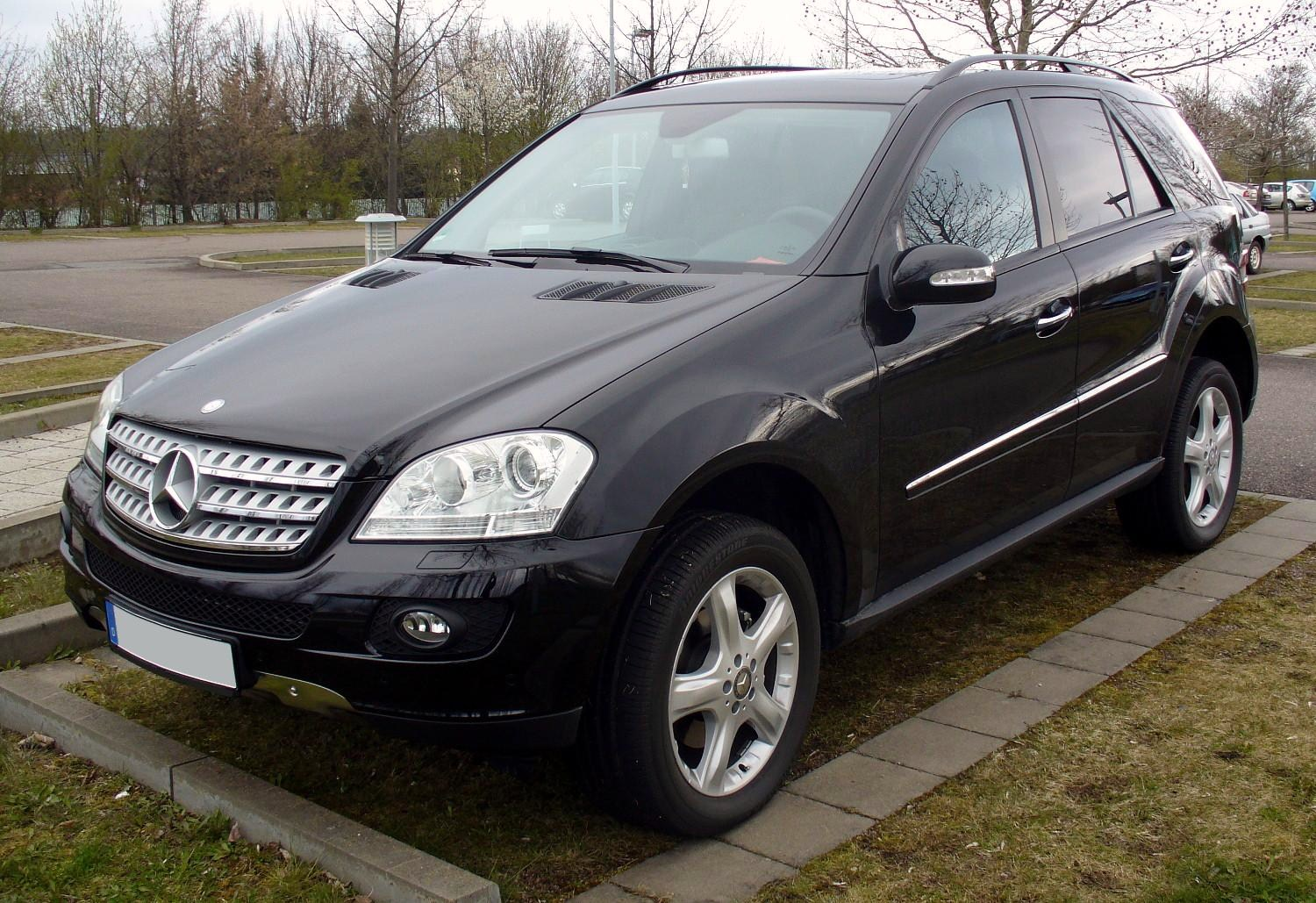 Mercedes-Benz W164